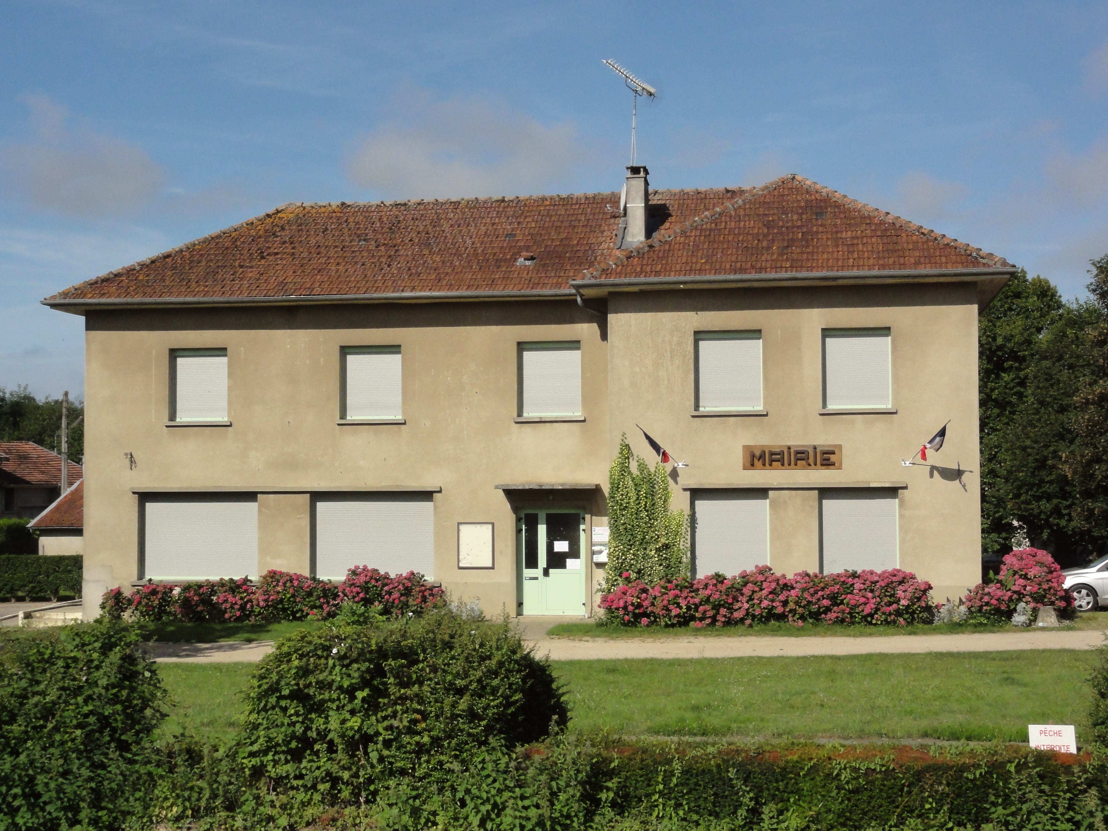 Couvonges (Meuse) mairie